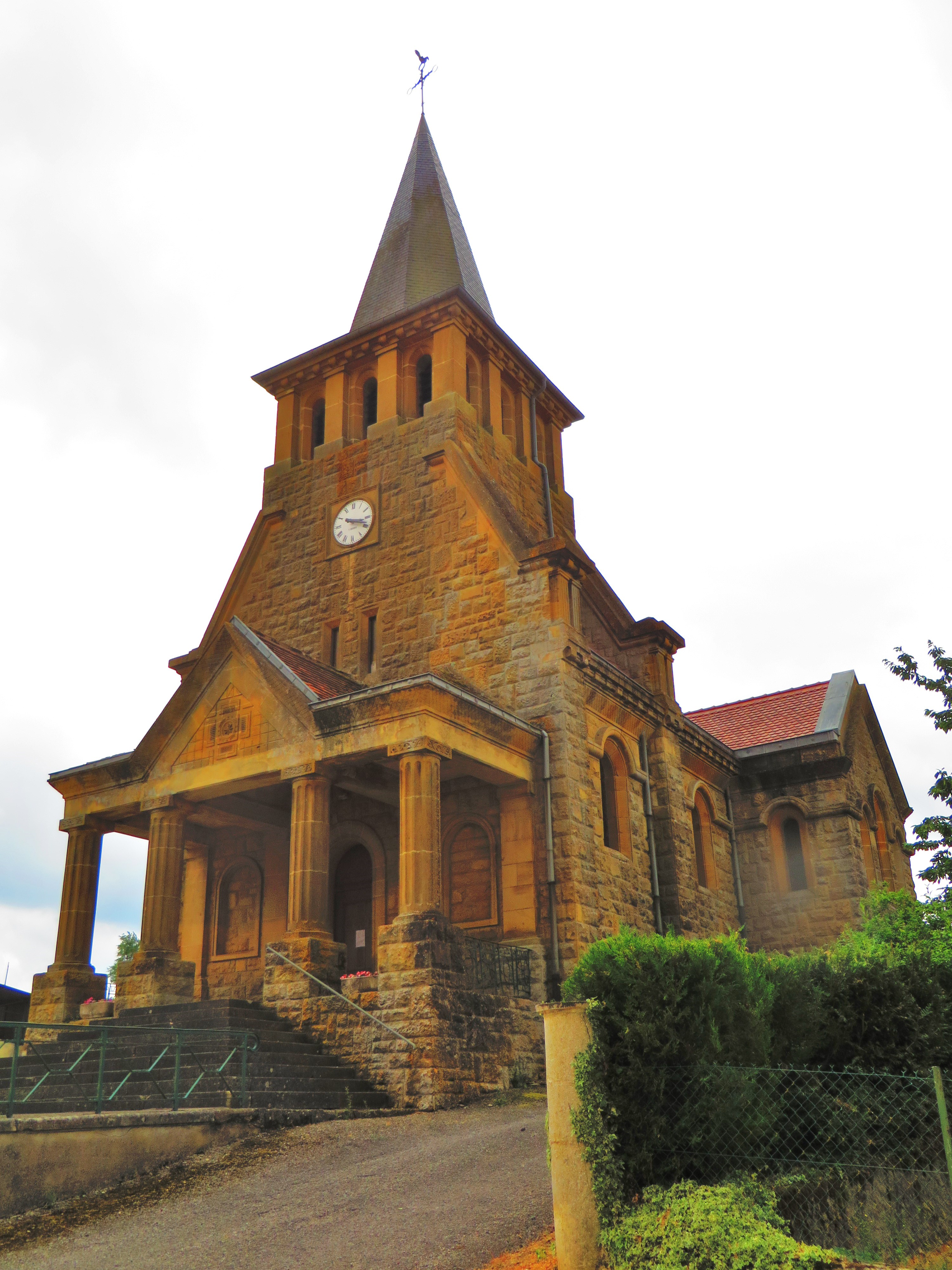 Ville-devant-Chaumont L'église de la Présentation-de-la-Bienheureuse-Vierge-Marie